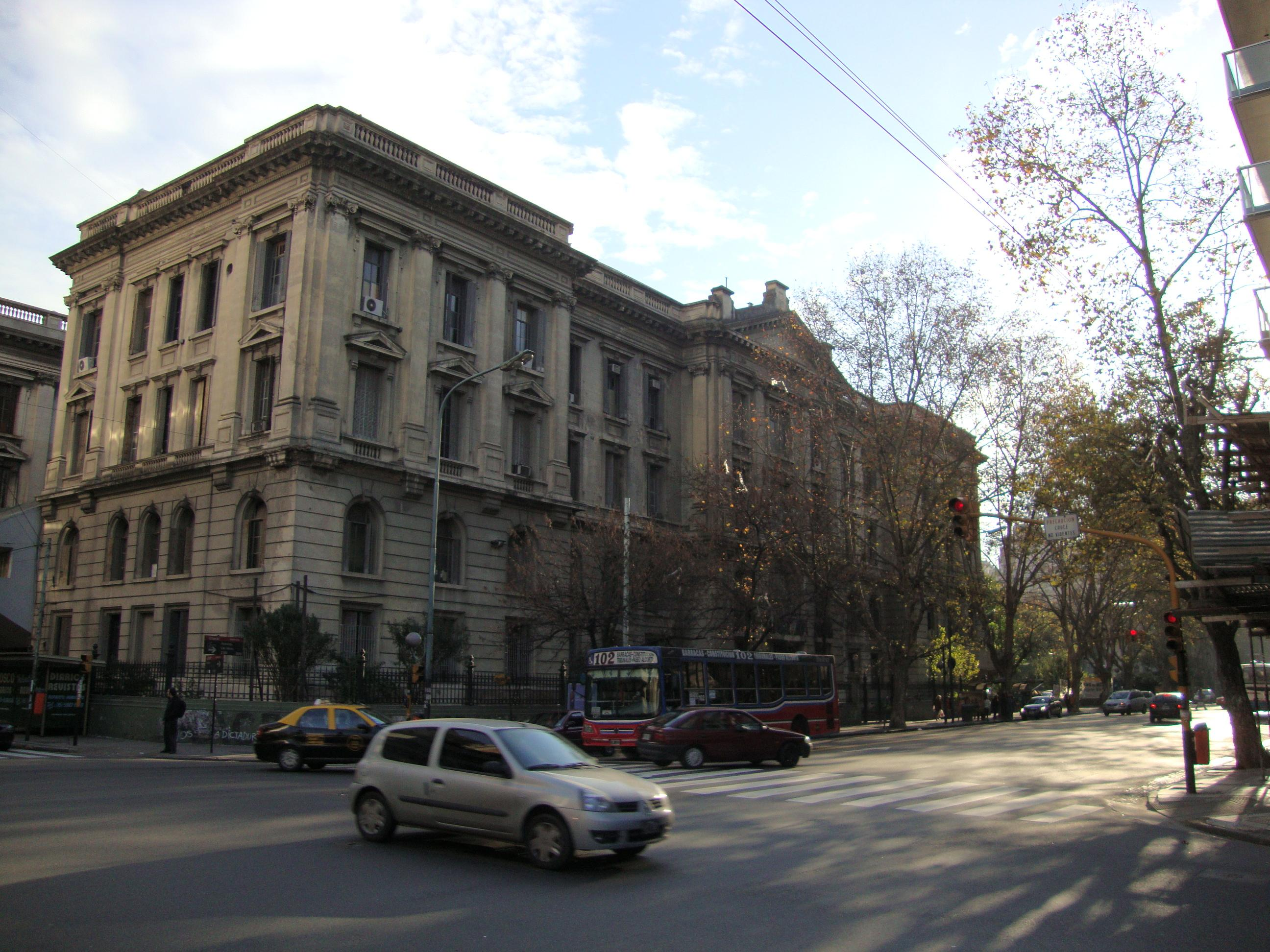 Fachada del edificio principal del Hospital Bernardino Rivadavia, en la ciudad de Buenos Aires.